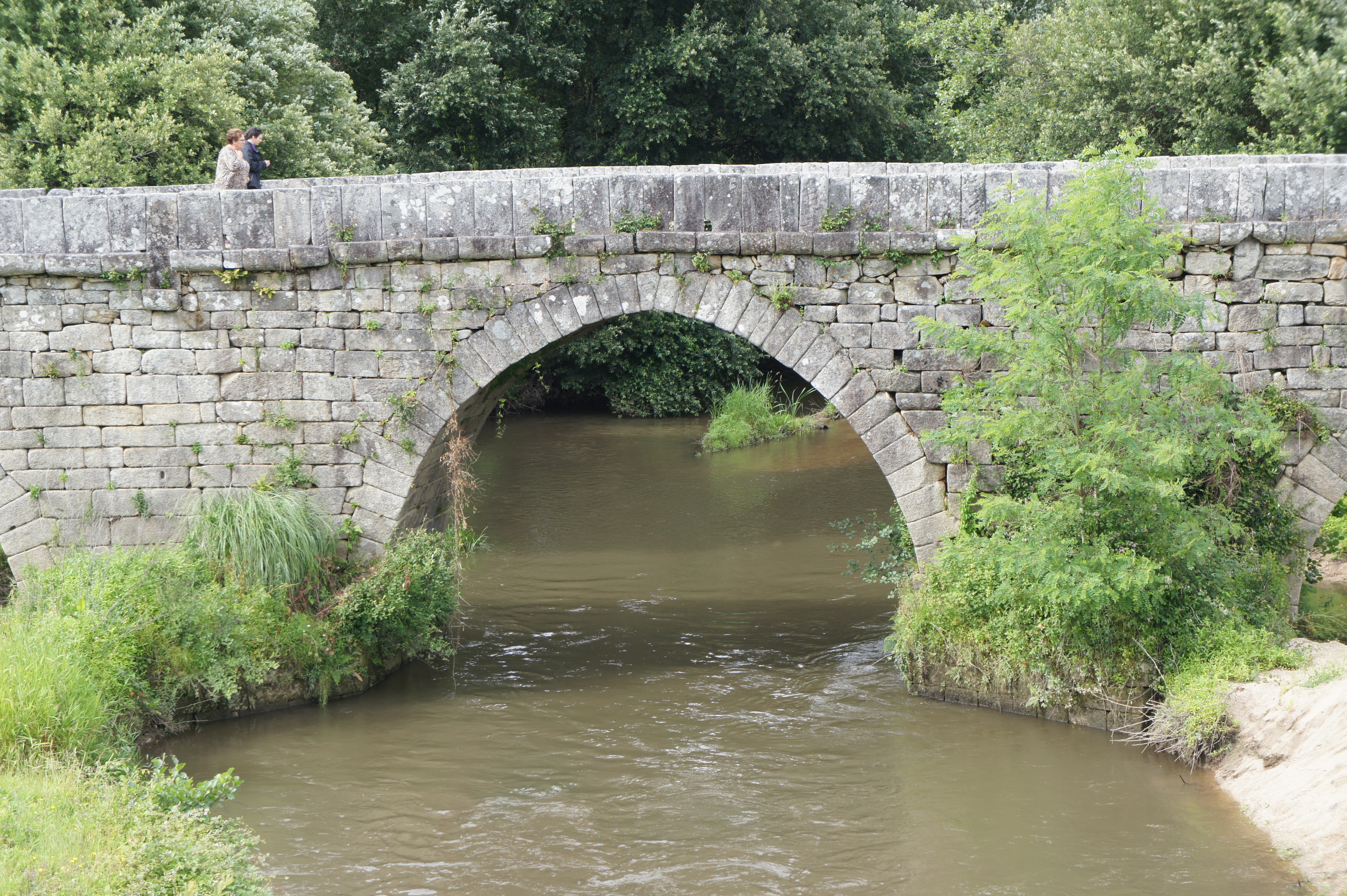 Muy cerca de la desembocadura en el río Miño.